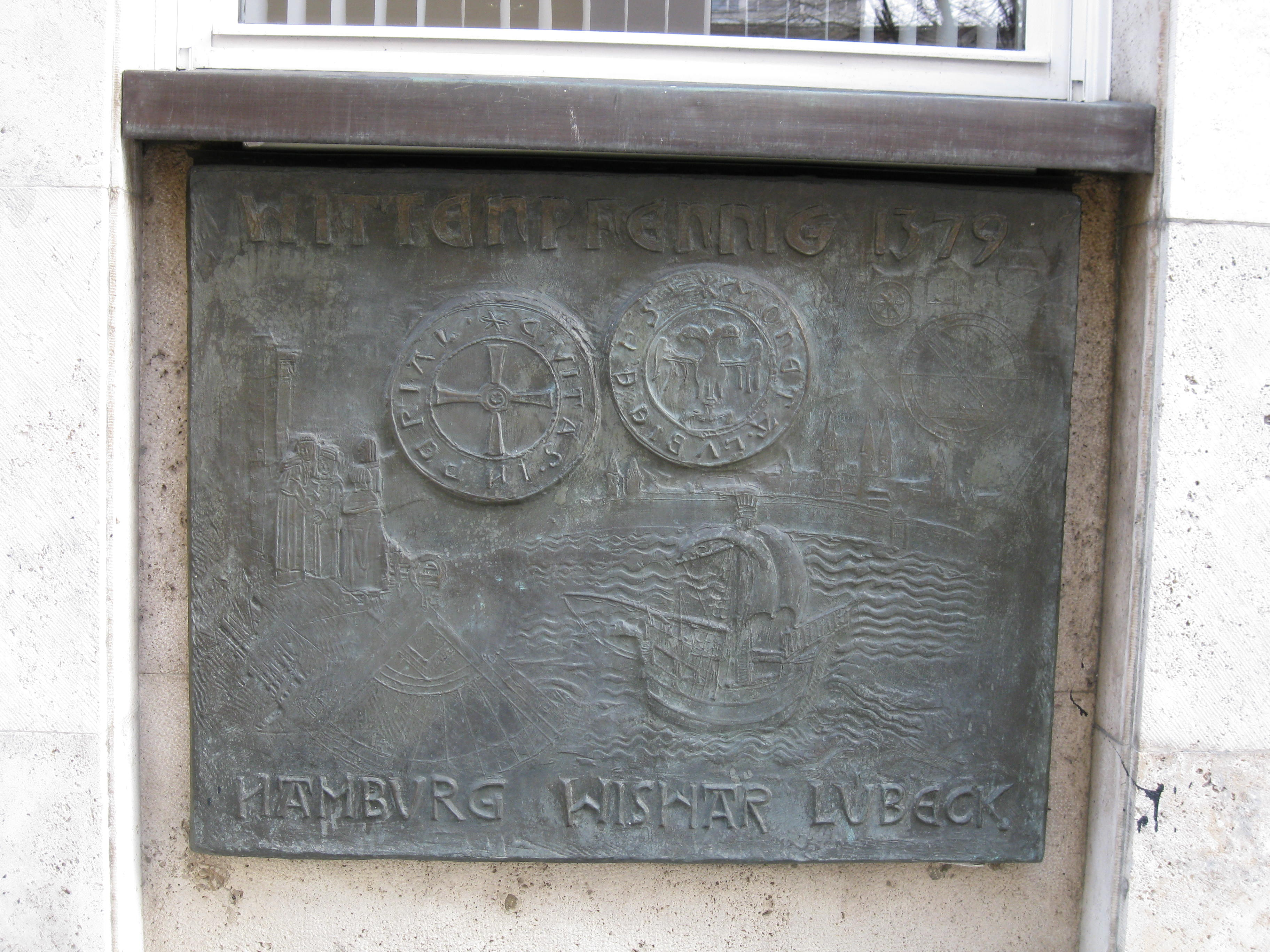 Kunst am Bau an der Deutschen Bank, Hauptfiliale München, Promenadeplatz: Ausrisse aus der Geschichte des Geldes auf Bronzetafeln. Hier: der Wittenpfennig aus dem Jahr 1379.